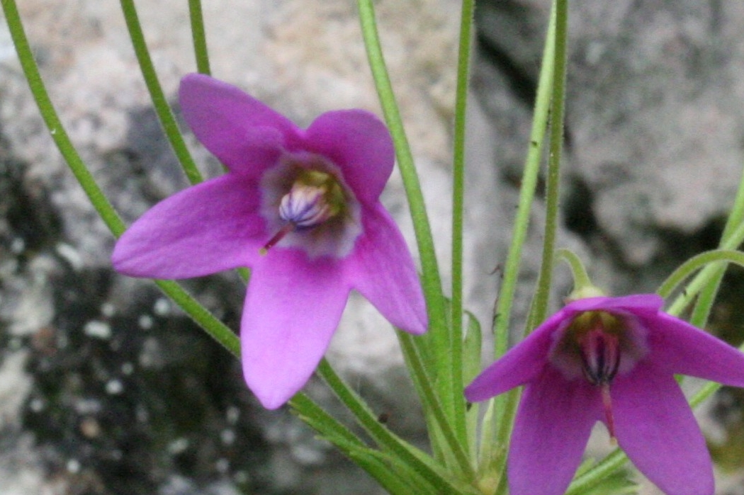 Cortusa_matthioli (Cortusa di Matthioli) Località "Giardino Botanico delle Alpi Orientali", Monte Faverghera (BL), 1500 m s.l.m.